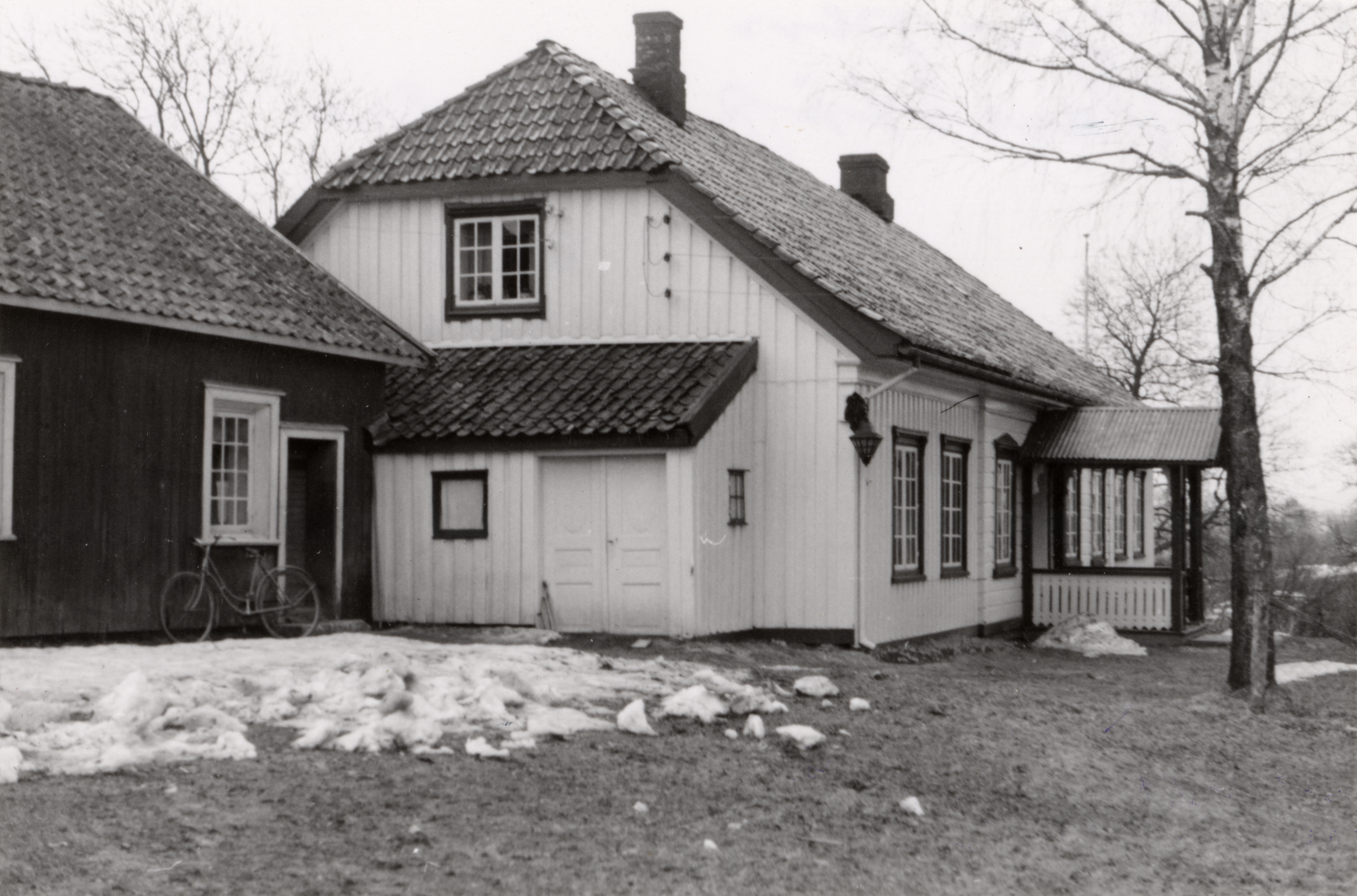 Venstøp Nordre, Henrik Ibsen museum i Venstøp Nordre, Telemark